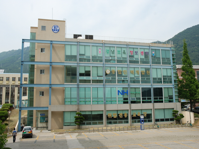 창원대학교 종합인력개발원